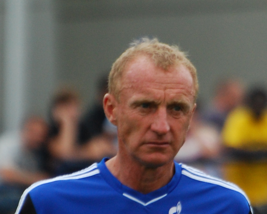 Josef "Seppo" Eichkorn